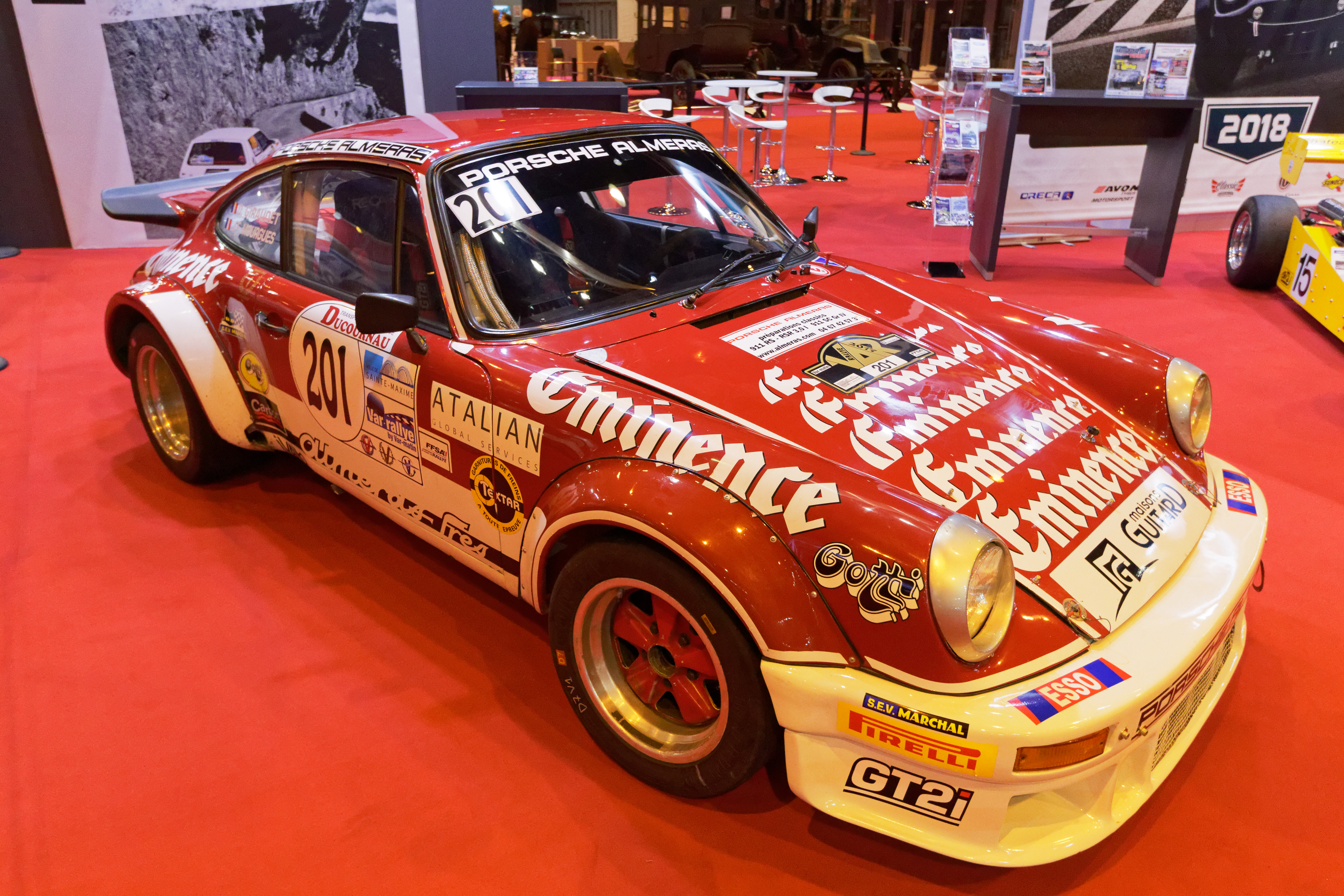 Une Porsche 911 exposée lors du salon Rétromobile 2018.